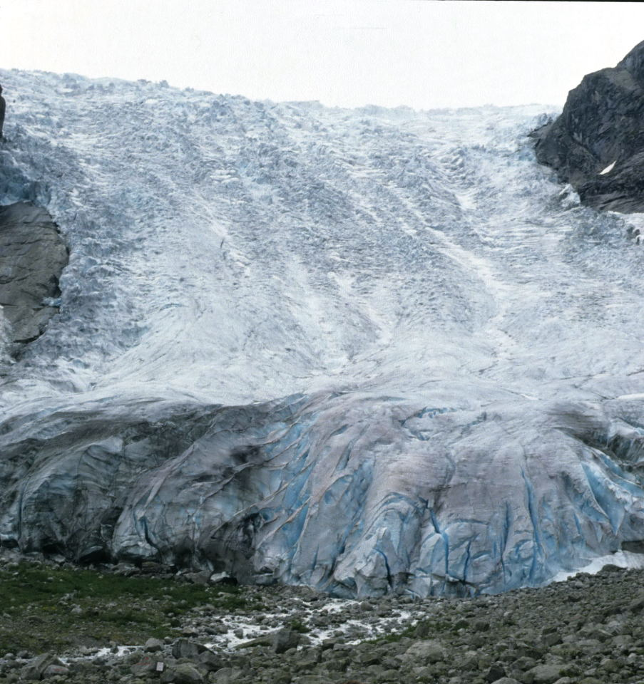 Bergsetbreen i Krundalen, Jostedalen, Luster kommune